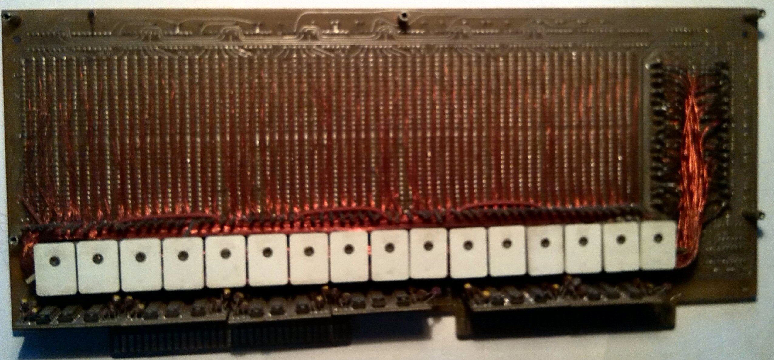 Az EMG 666 programozható asztali számológép fűzött ROM kártya,, 2048 x 32 bit kapacitású